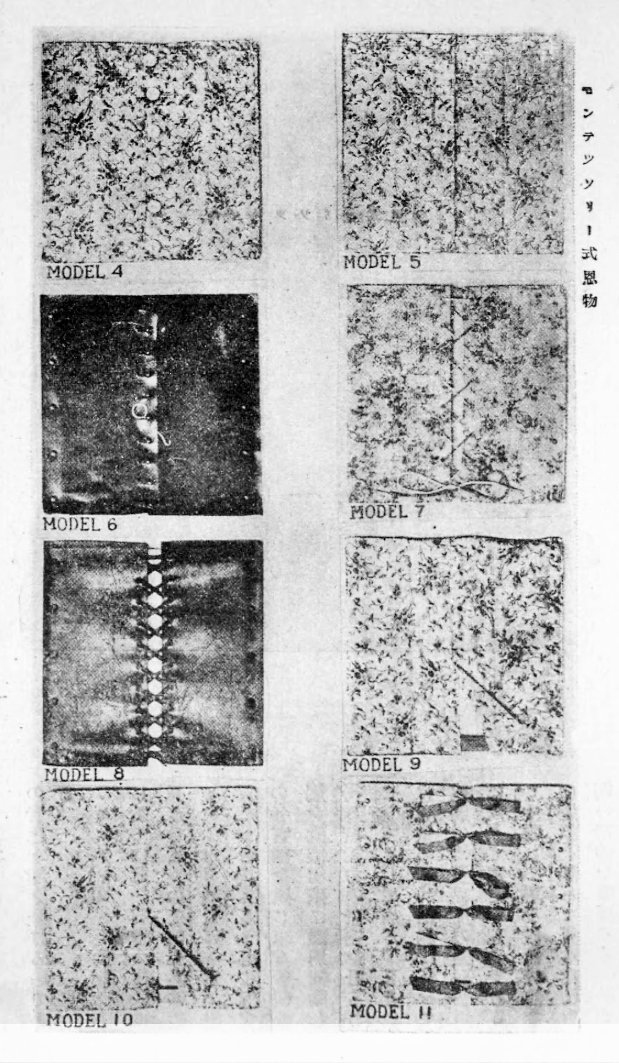 モンテッソーリ式恩物 小学校長団の観たる米国の教育 東京市教育会 編 (佐藤出版部, 1920)